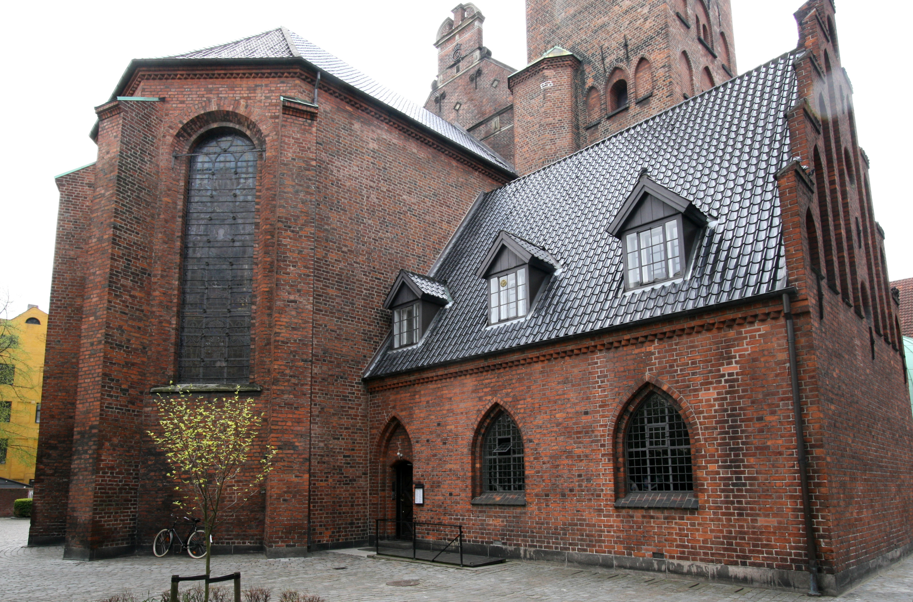 Helligåndskirken, Copenhagen, Denmark. From northeast.